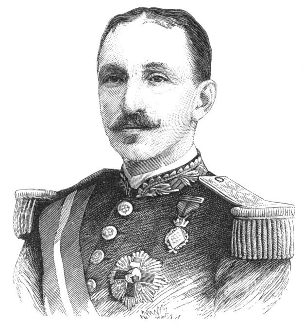 "Le général François de Bourbon".